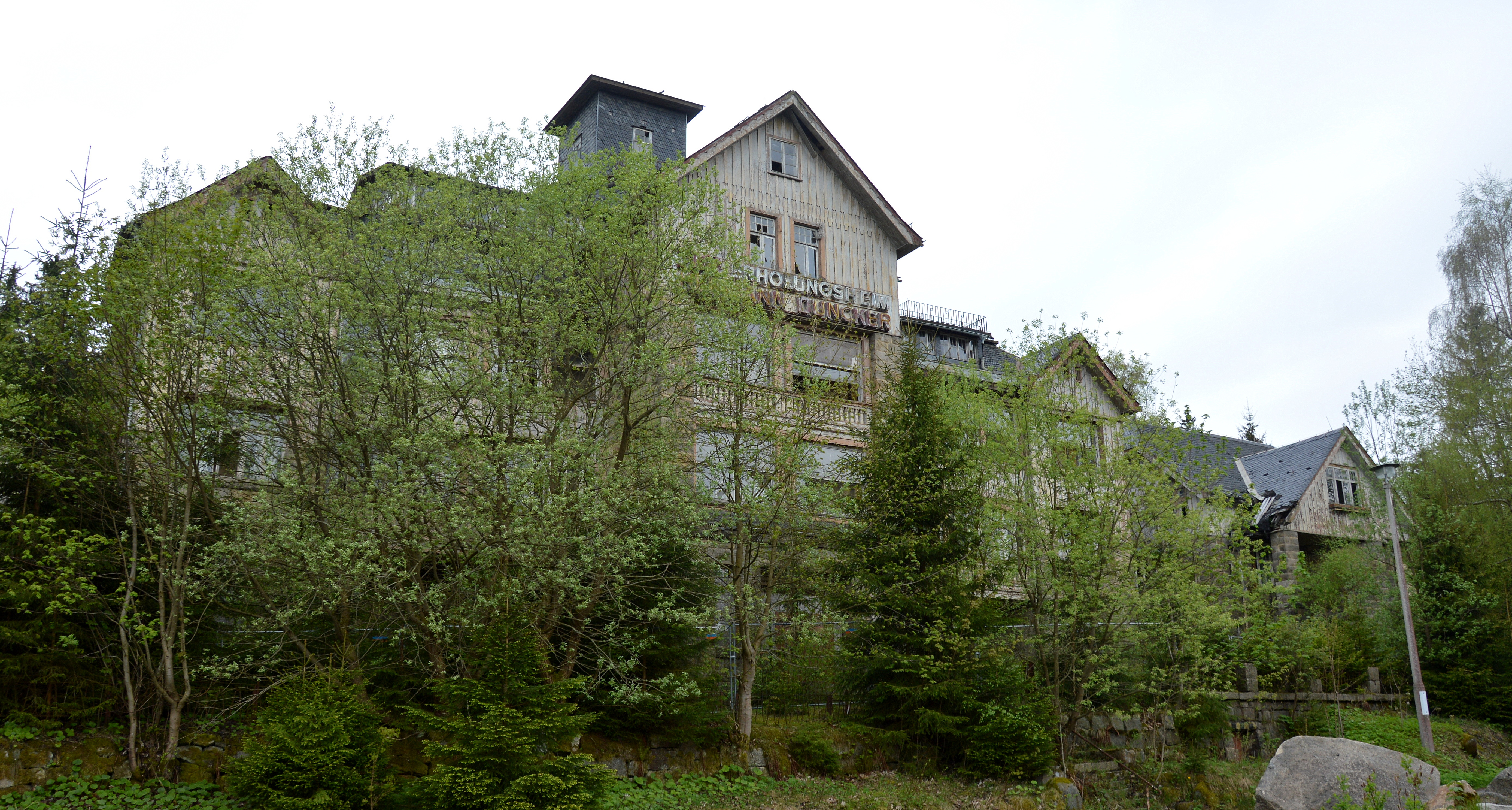 Barenberg 10 in Schierke